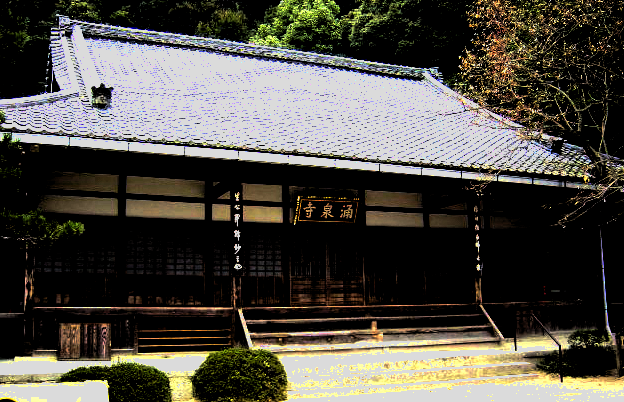 涌泉寺の本堂概観